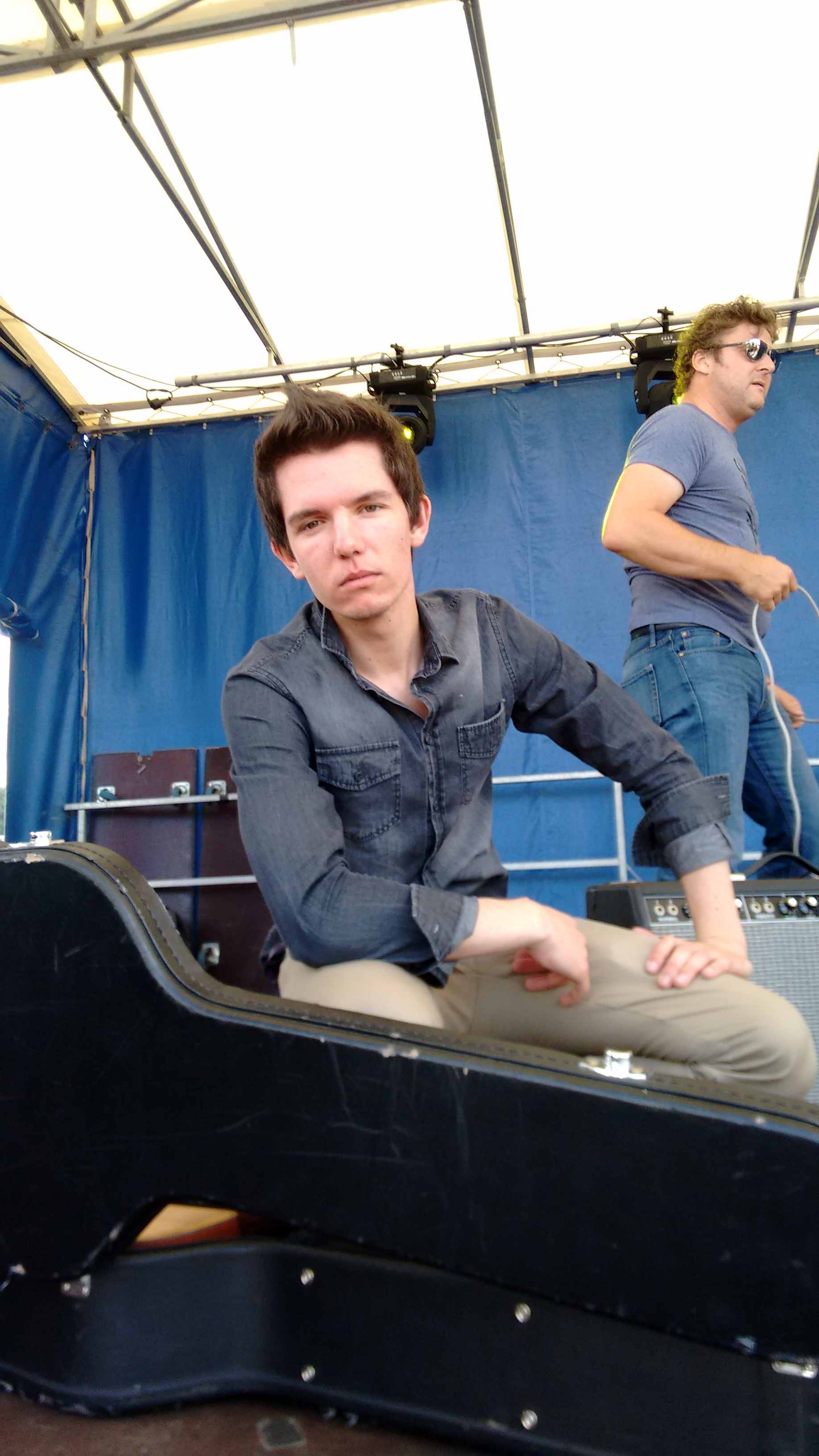 Milo Meskens op Crammerock 2016